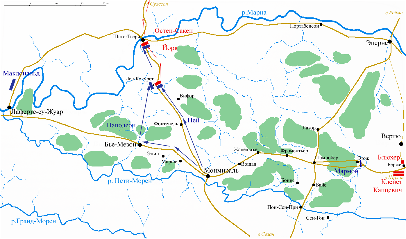 "Кампания 6-ти дней" Наполеона. День третий. 12 февраля 1814. Сражение при Шато-Тьери.